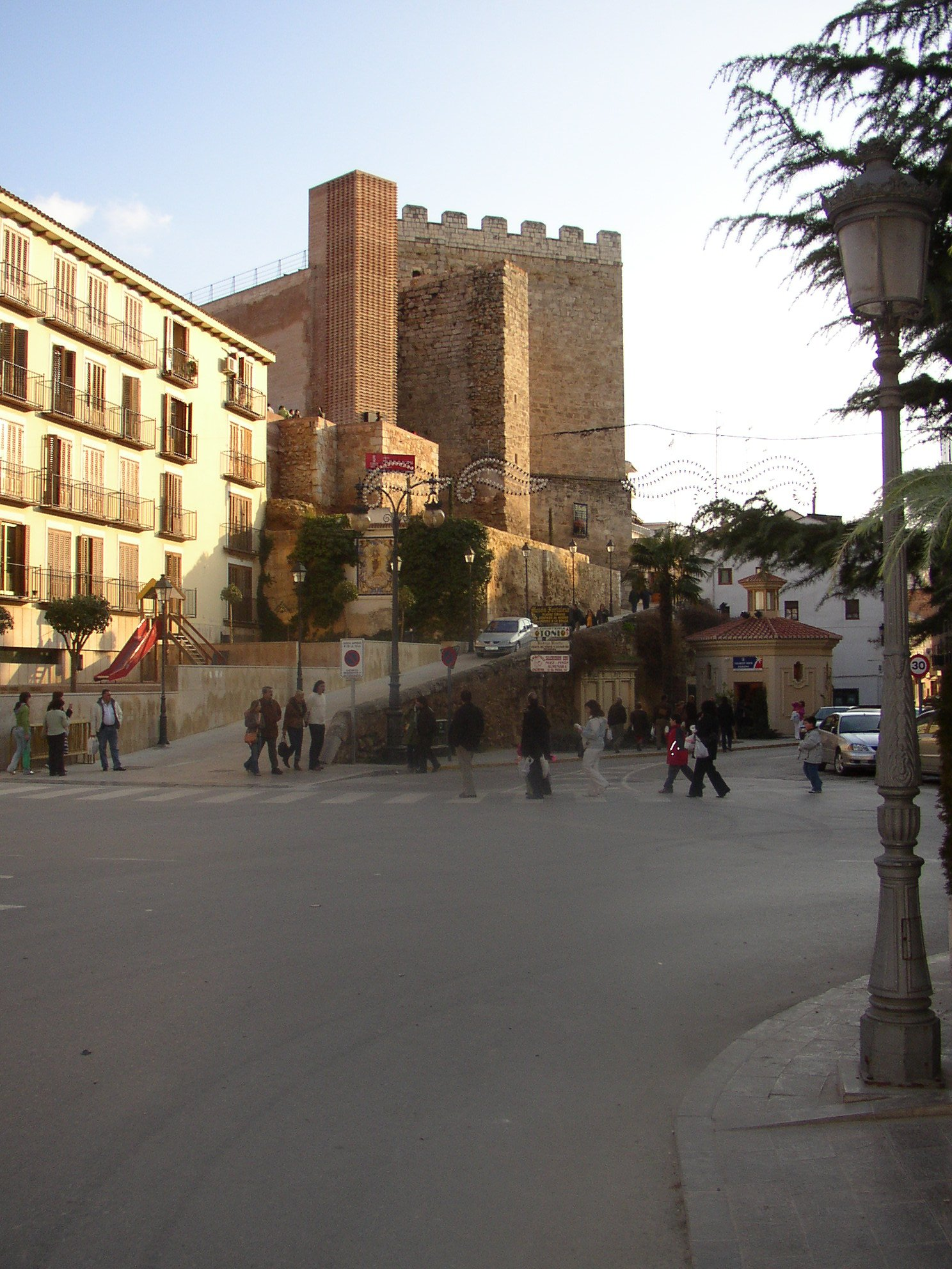 Requena és un municipi valencià a la comarca de la Plana d'Utiel. Fortalesa de Requena.